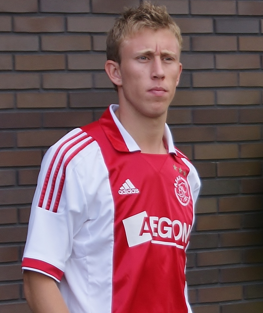 Dico Koppers